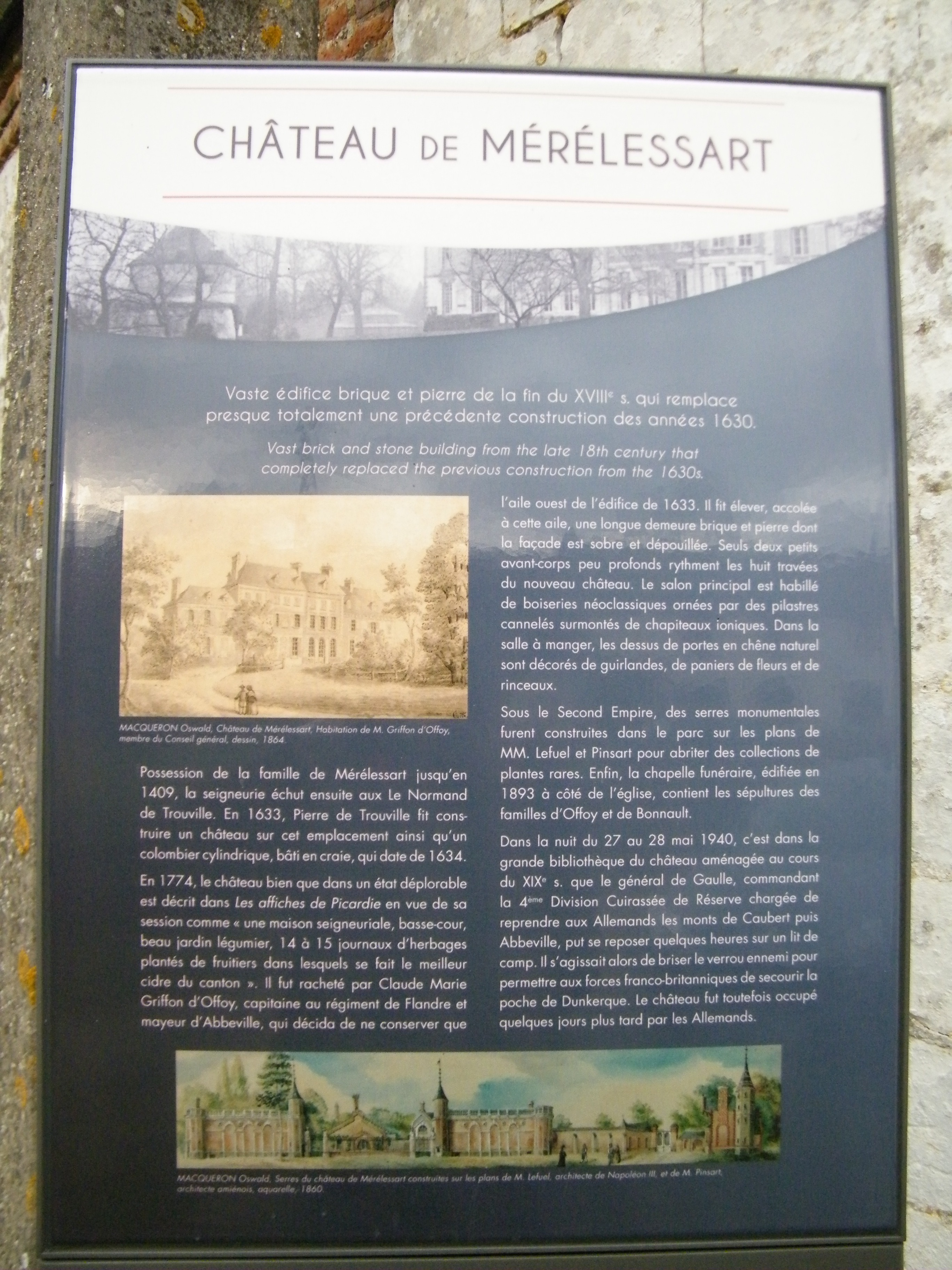 Mérélessart, Somme, Fr, château, historique.